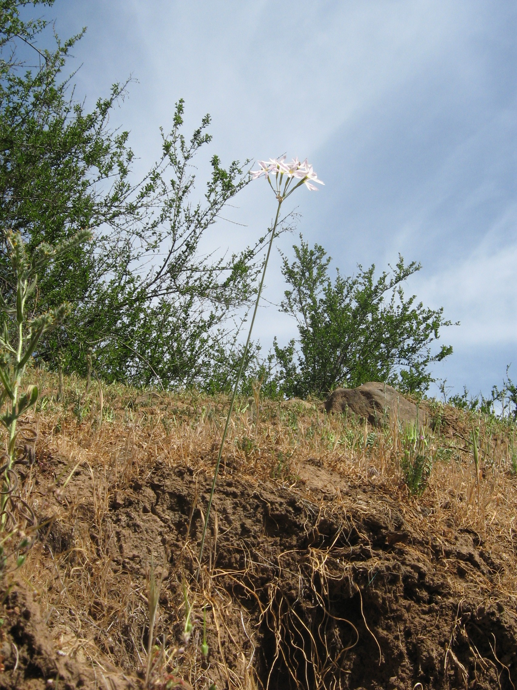 Leucocoryne ixioides (Hook.)Lindl. Santiago, Lo Cañas